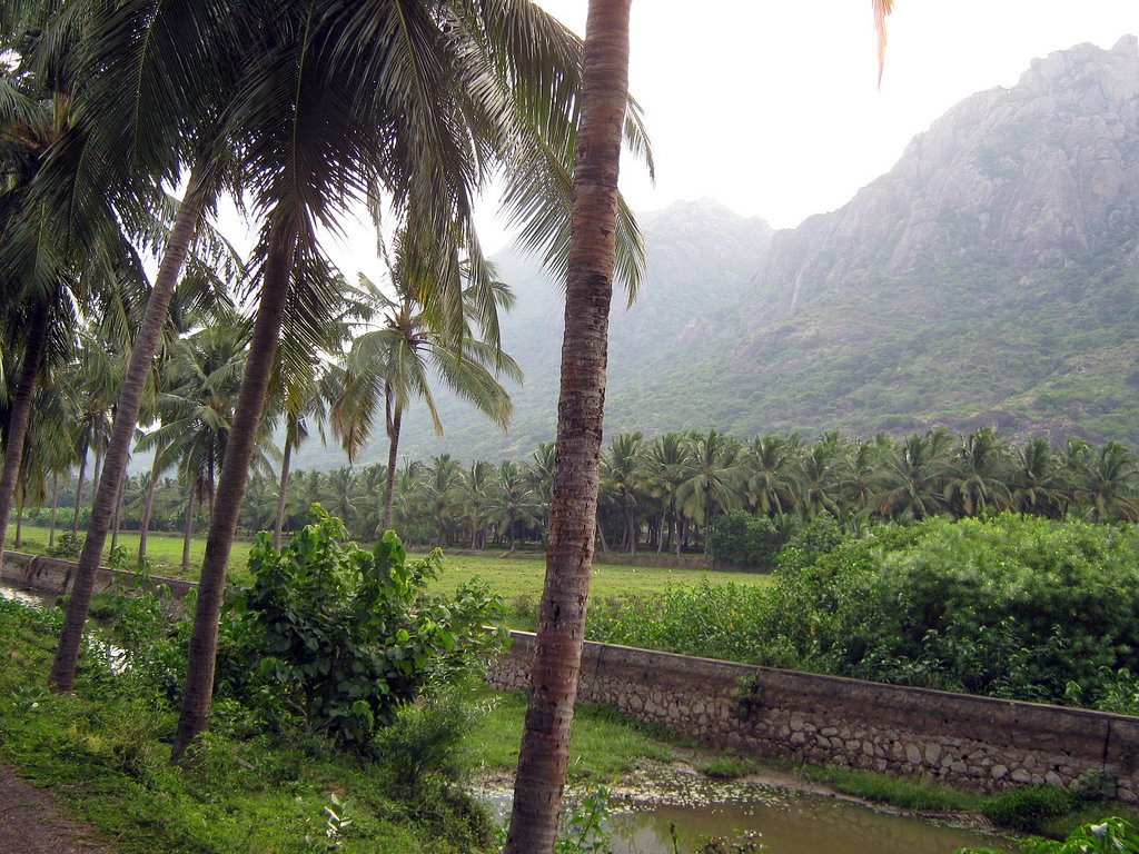 Nagercoil, Tamil Nadu, India.